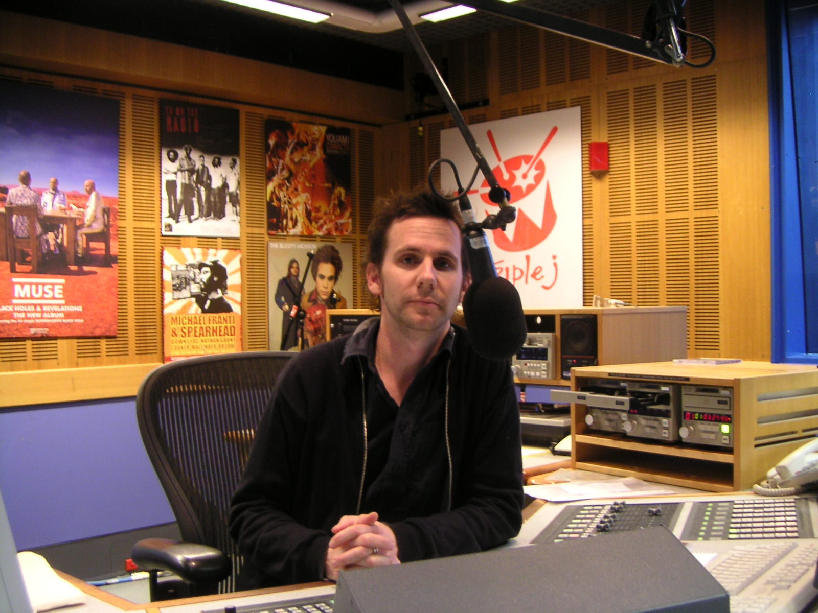 Robbie interviewed me